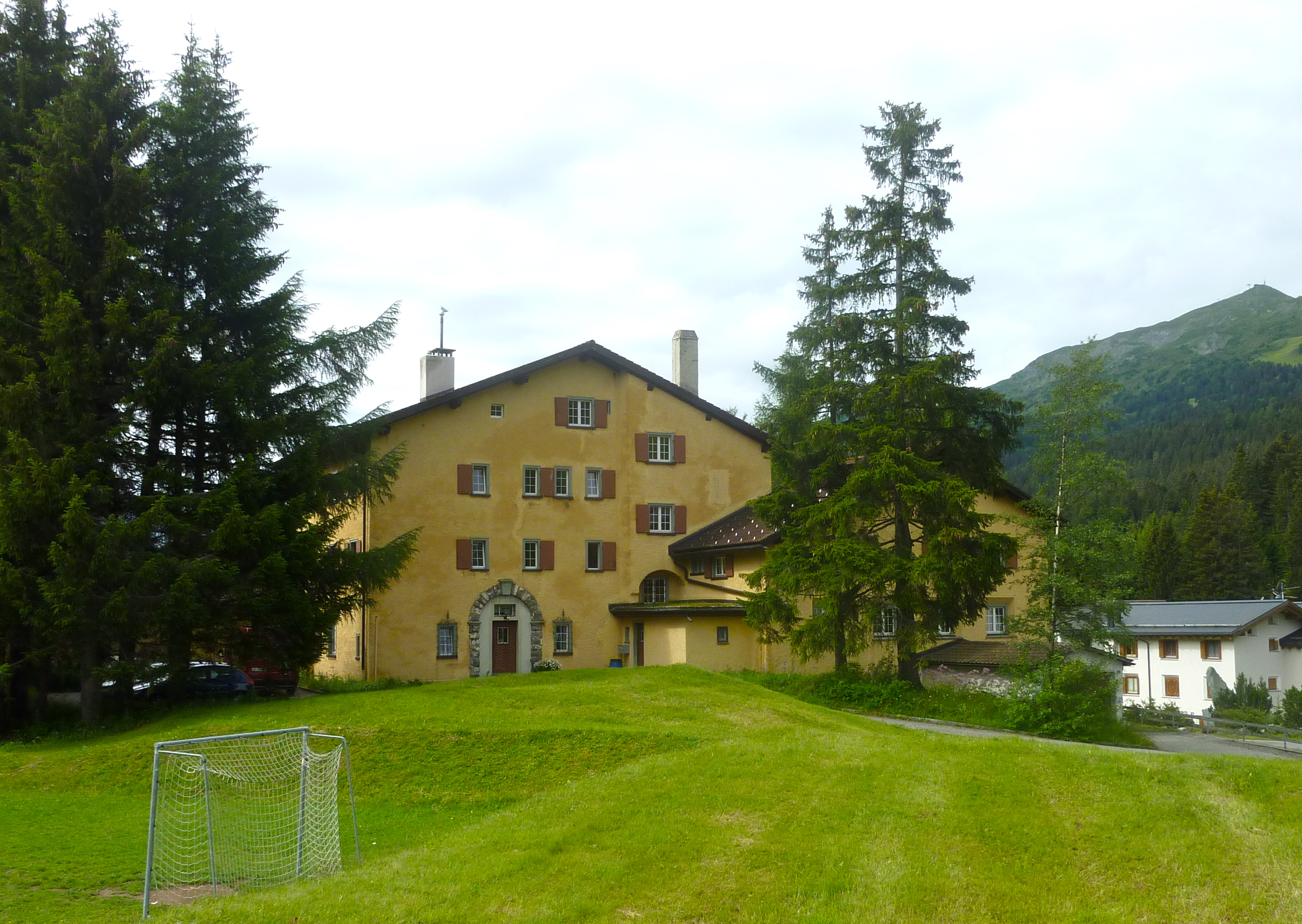 Valbella : Haus Casoja der Kantonsschule Hohe Promenade, Zürich